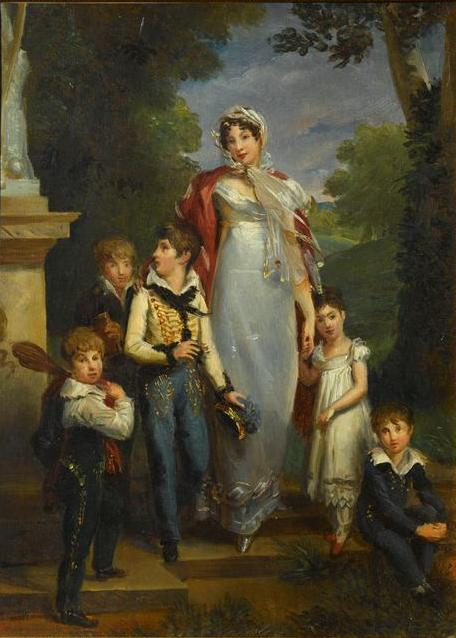 réduction d'un original de 1817 dans la collection Sabran-Pontèves